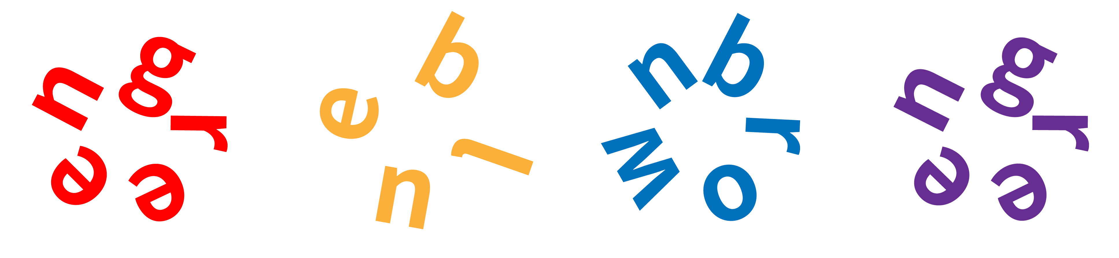 扭曲環形的文字